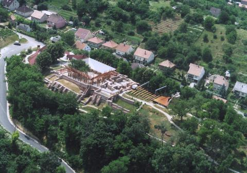 Kaposszentjakab, Hunagry, aerialphotography